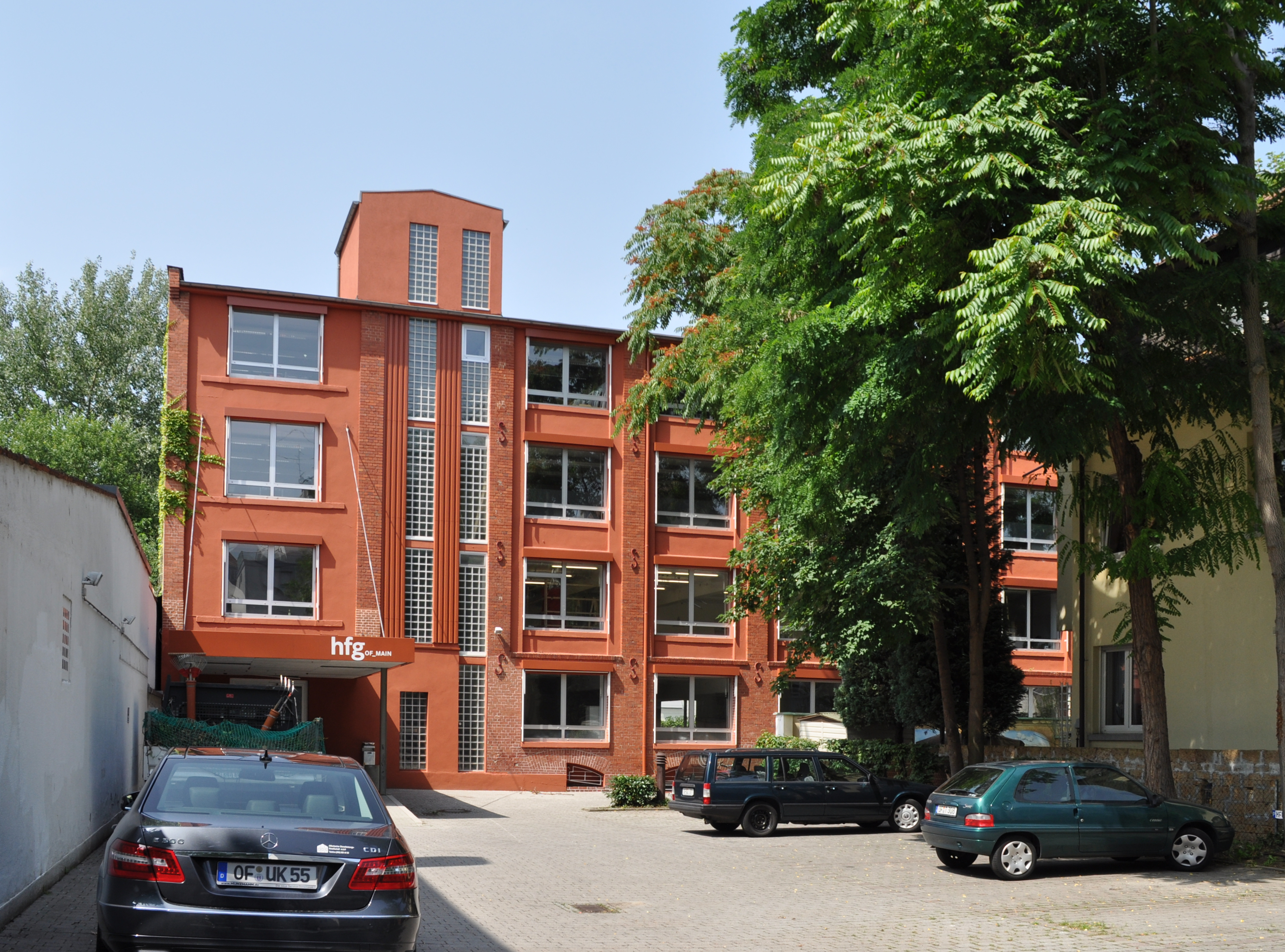 Offenbach, HfG, Geleitstraße 103